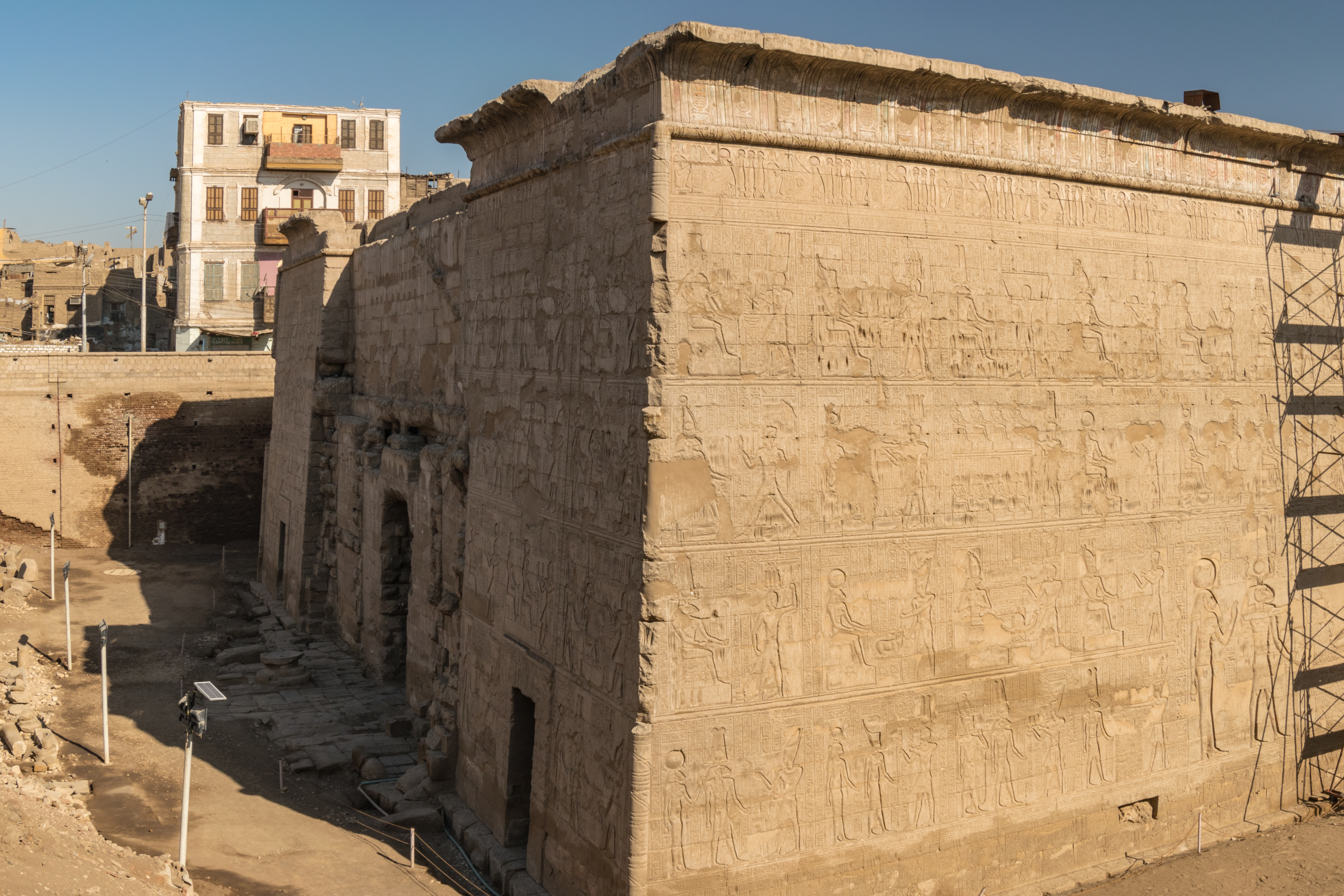 Rück- Seitenansicht vom Säulensaal des Esna Tempels